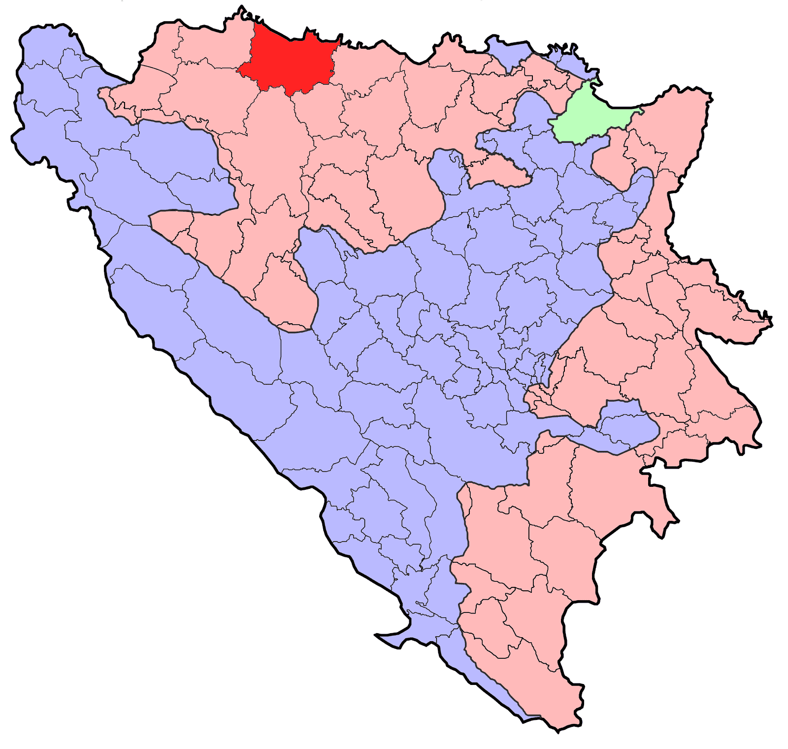 Republika Srpska (BiH) municipality